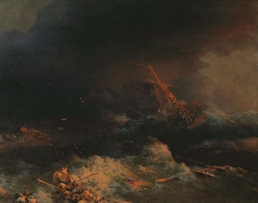 Крушение корабля "Ингерманланд" в Скагерраке в ночь на 30 августа 1842.